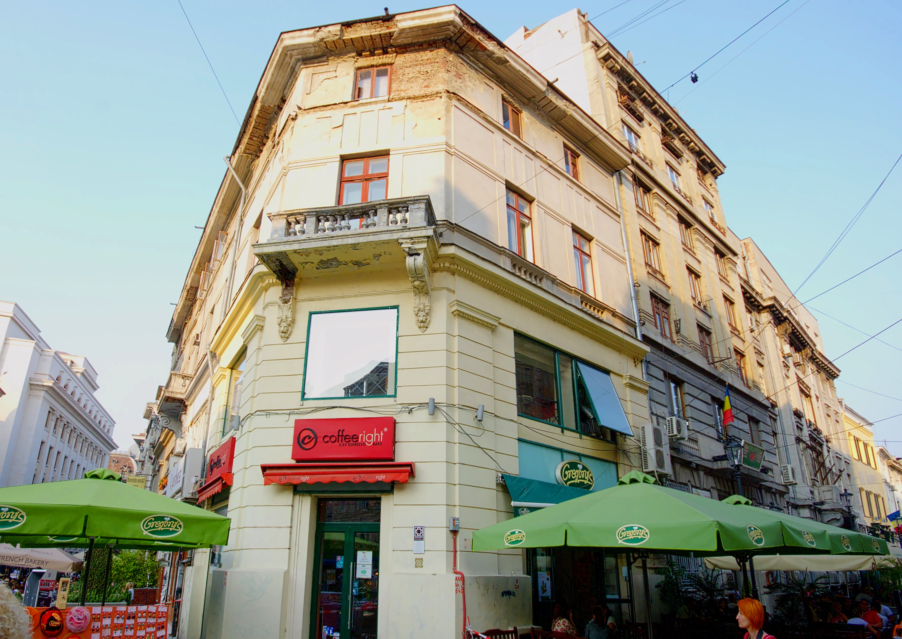 Casă cu prăvălie, Lipscani 27